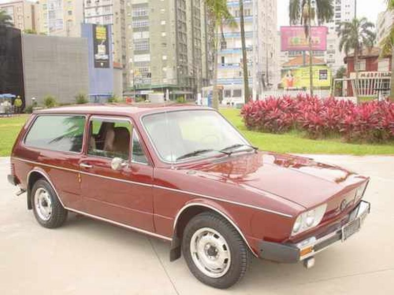 Camioneta marca VW Variant 1970.